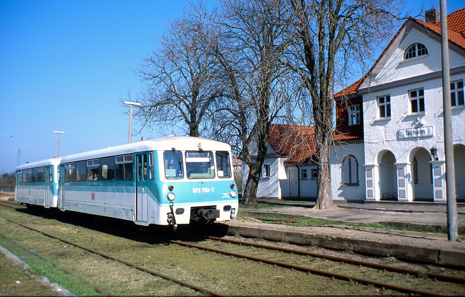 Verbrennungstriebwagen der VT 2.09 der Deutsche Reichsbahn im Bahnhof Tucheim.